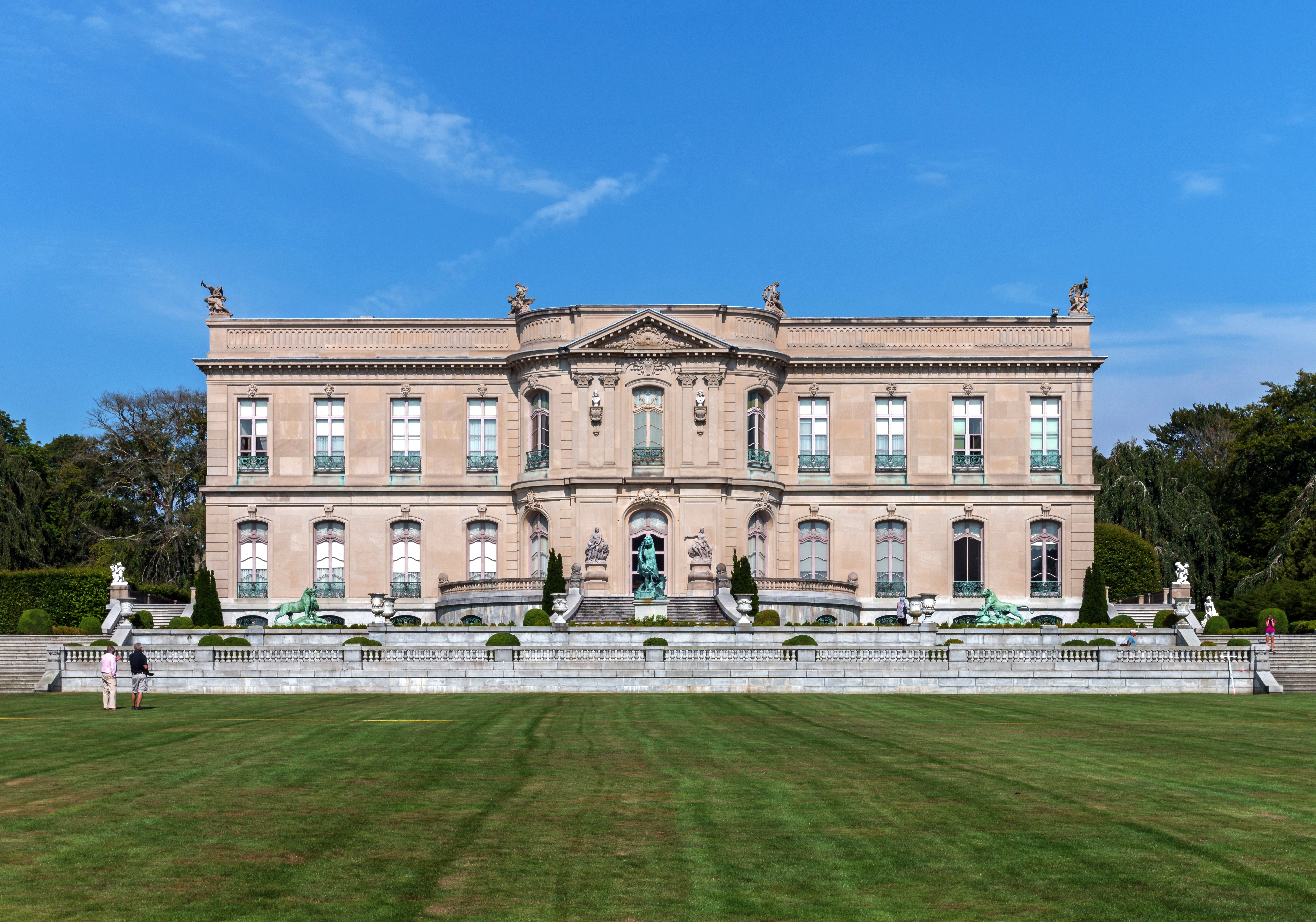 The Elms (Rhode Island)